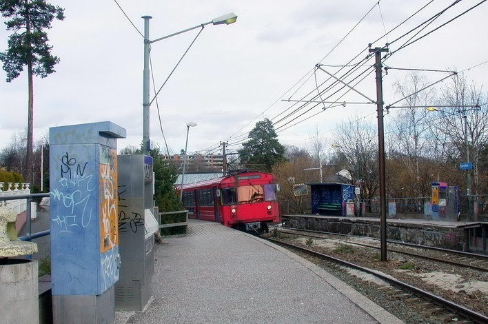 Gamle Bjørnsletta stasjon var en av stasjonene på Kolsåsbanen, nedlagt 2006. Bildenummer: A-70036/Ub/0004/352